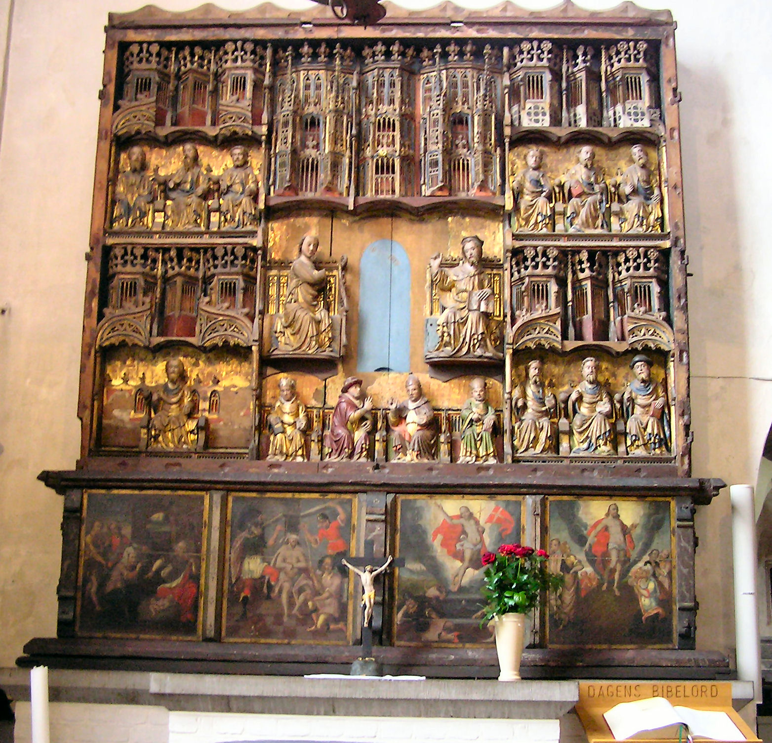 Sankt Maria Kirke,Ystad, Middelaldeerlig fløjaltertavle